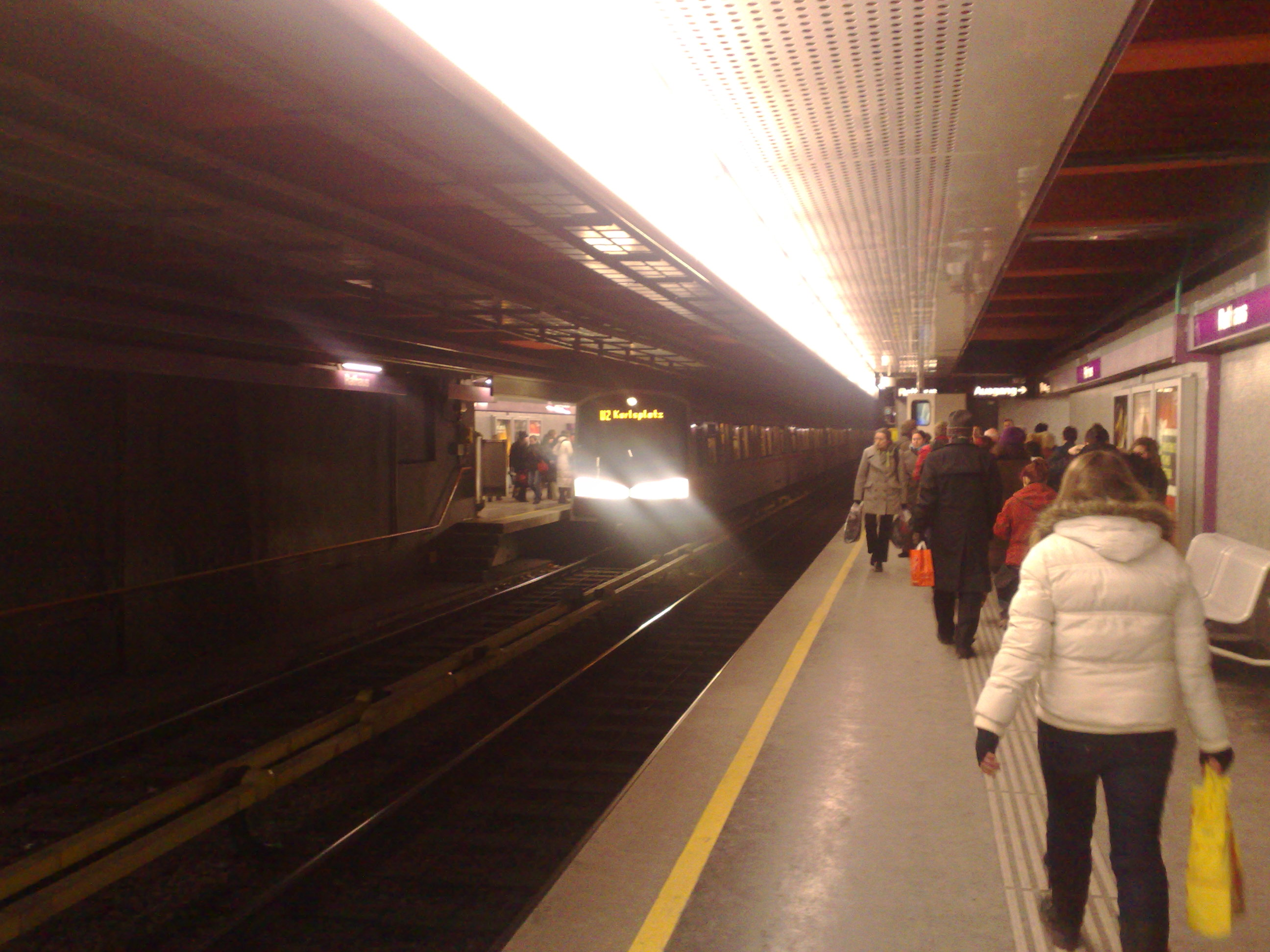 zobrazuje stanicu metra Rathaus